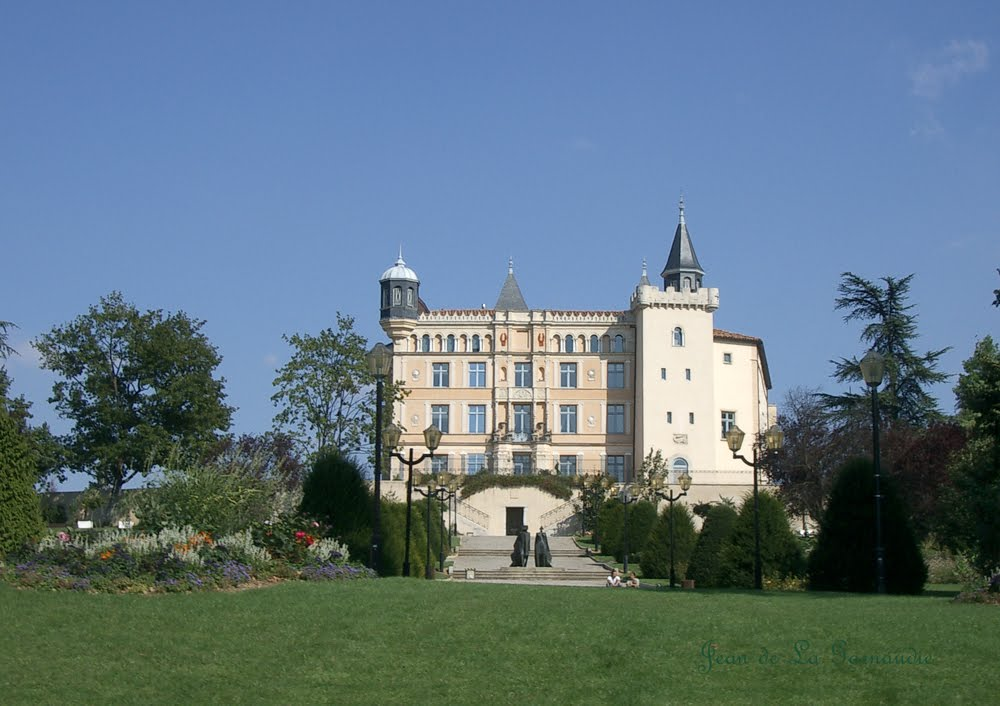 Le Château de Saint-Priest